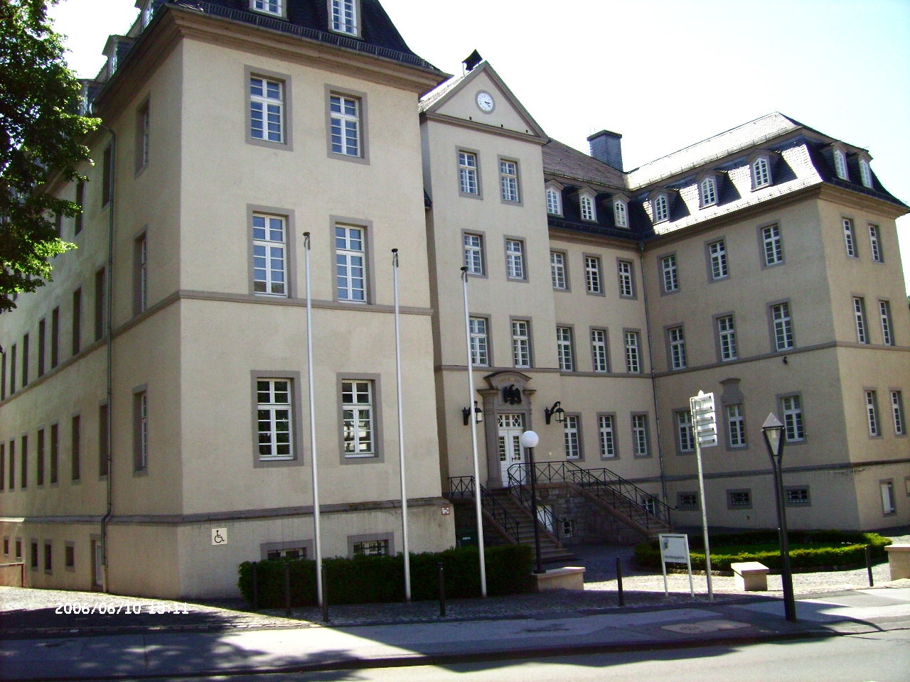 Gebäude des Verwaltungsgerichts Arnsberg, diente ca. 1816–1920er als Sitz der Bezirksregierung Arnsberg (heute genannt „Alte Regierung“) This is a photograph of an architectural monument. 155